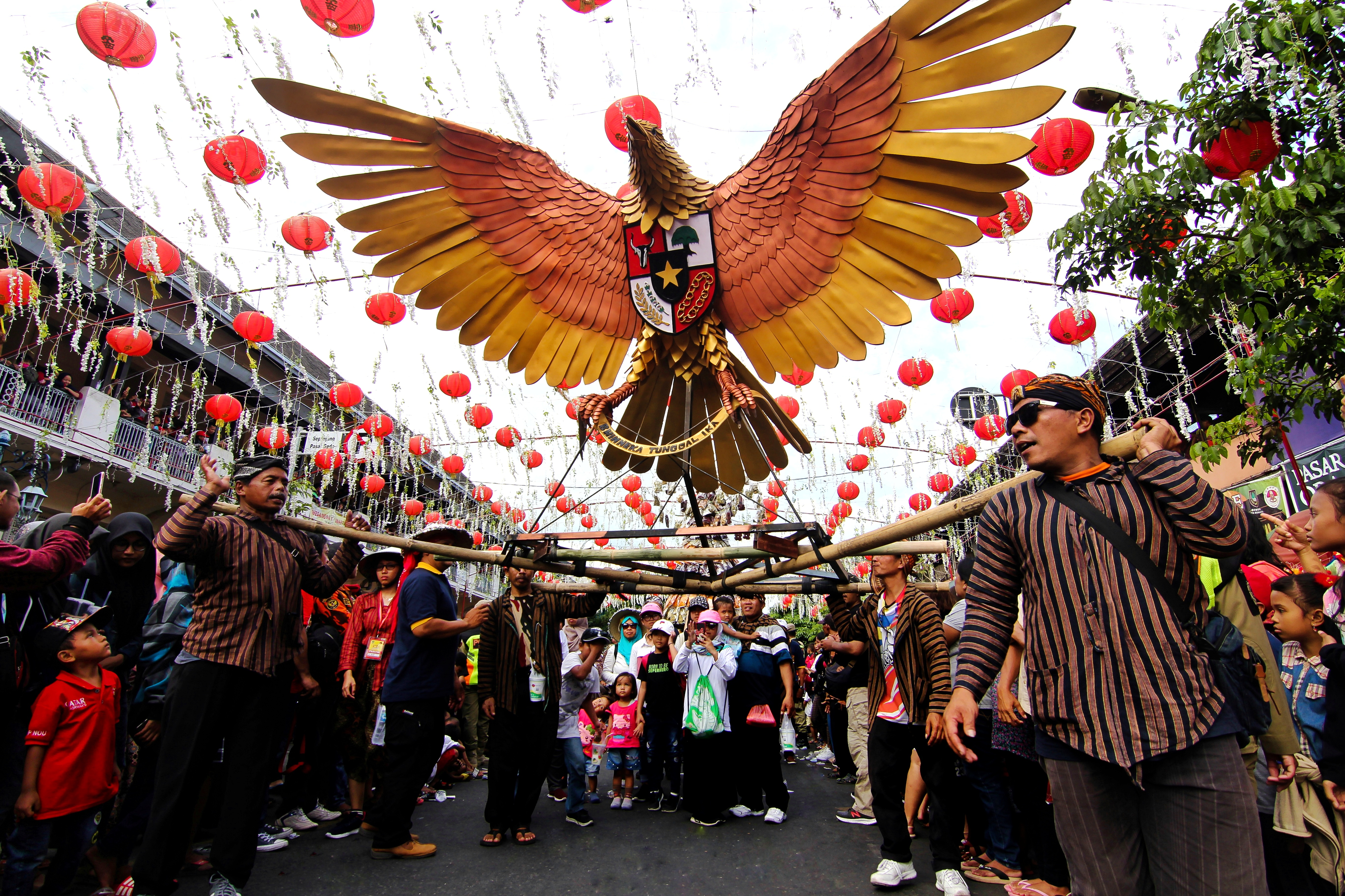 Peserta grebeg sudiro bersatu mengangkat replika burung garuda yang merupakan lambang negara indonesia